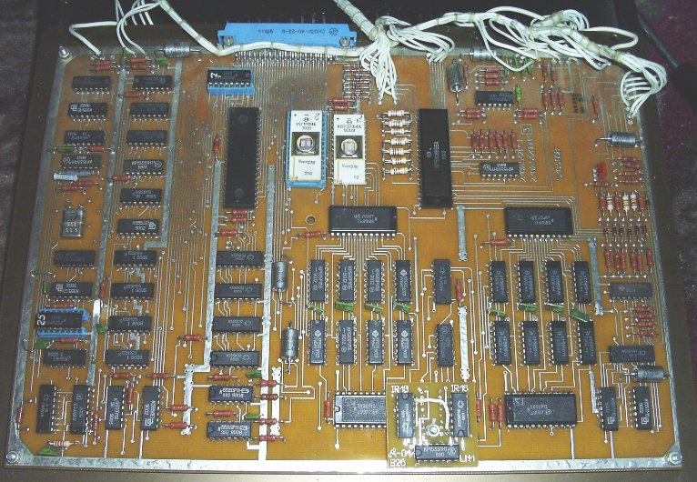 Dubna 48K mainboard